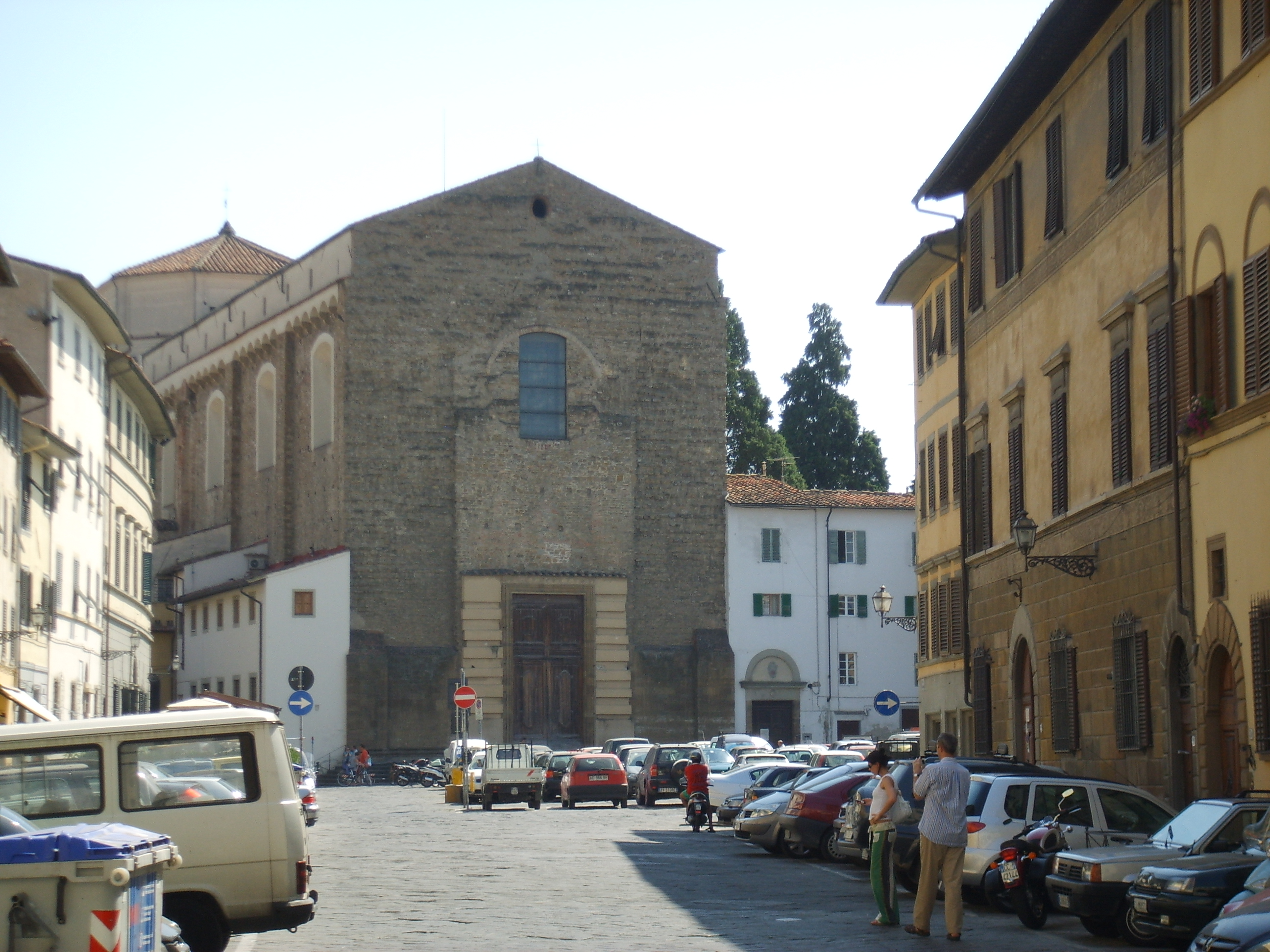 Piazza del Carmine, Florence, Italy